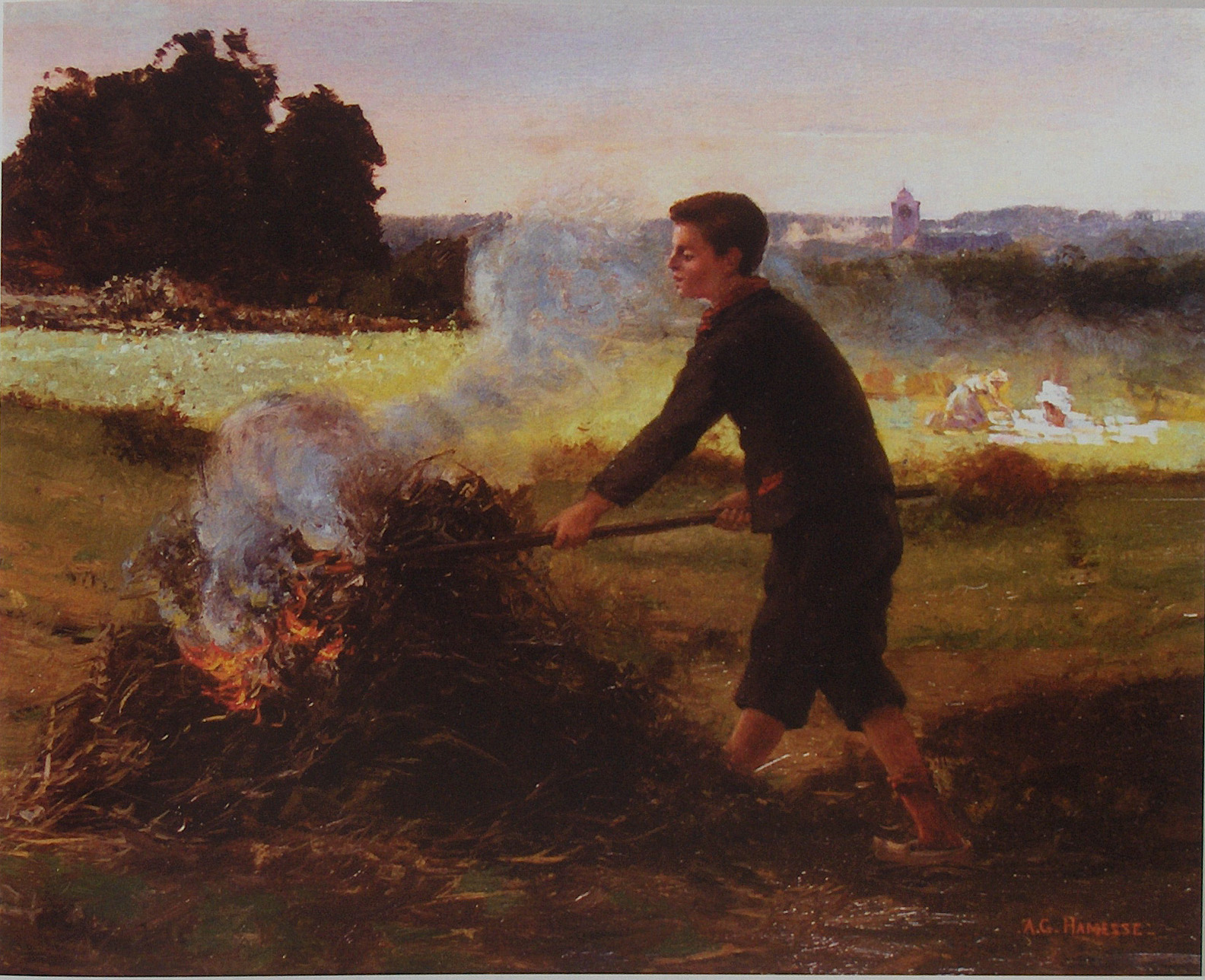 "Het verbranden van het aardappelloof" - olieverf op doek door Adolphe Hamesse (1849-1925); 32,3 x 39 cm; privé-bezit